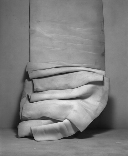 fotografie Ivana Pinkavy